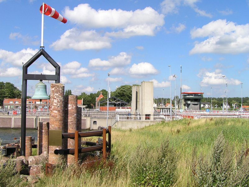 Een kunstwerk herinnert aan de renovatie van de Oranjesluizen. Opschrift plaquette: "Dit kunstwerk is een herinnering aan de oude Oranjesluizen. De kolommen komen uit boorgaten in de sluismuren. Deze gaten waren nodig om de stalen boorpalen aan te kunnen brengen voor een nieuwe fundering voor de 125 jaar oude sluizen. Ze zijn schuin geboord. De ijzeren balken met tanden zijn de vroegere heugelstangen waarmee de deuren van de sluizen werden bewogen. De koperen mistbel hing vroeger op de sluizen om schepen te waarschuwen bij slecht zicht. Dit kunstwerk is een ontwerp van dhr. J. Driessen, voormalig architect bij de firma Haskoning in Nijmegen. 2001." Achter de sluizen ligt het dorp Schellingwoude. Foto juli 2005.